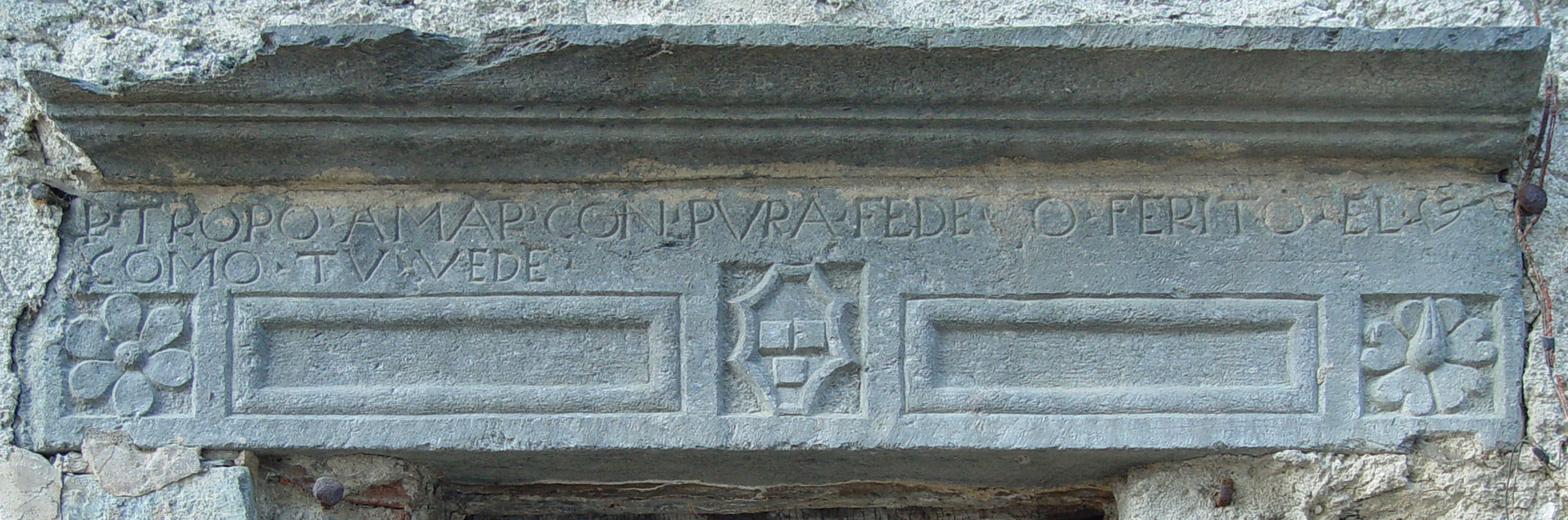 Description Iscrizione d'amore rinascimentale in Largo Besta de' Gatti Date n/a Location Chiuro, Sondrio - Italy Photographer Franco Folini